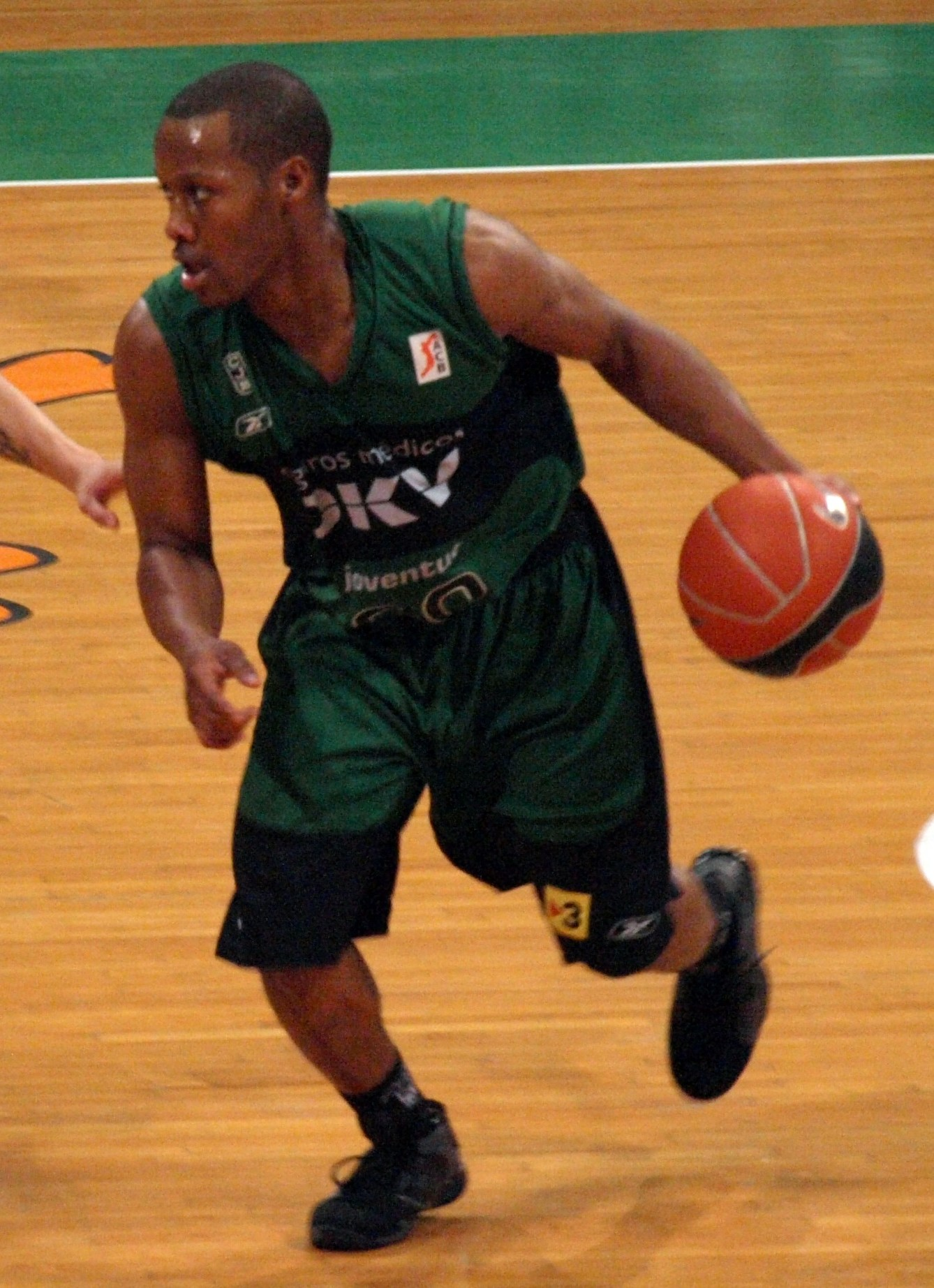 Demond Mallet, en el partido que enfrentó al DKV Joventut y al CB Murcia en el Olímpico de Badalona en enero de 2009